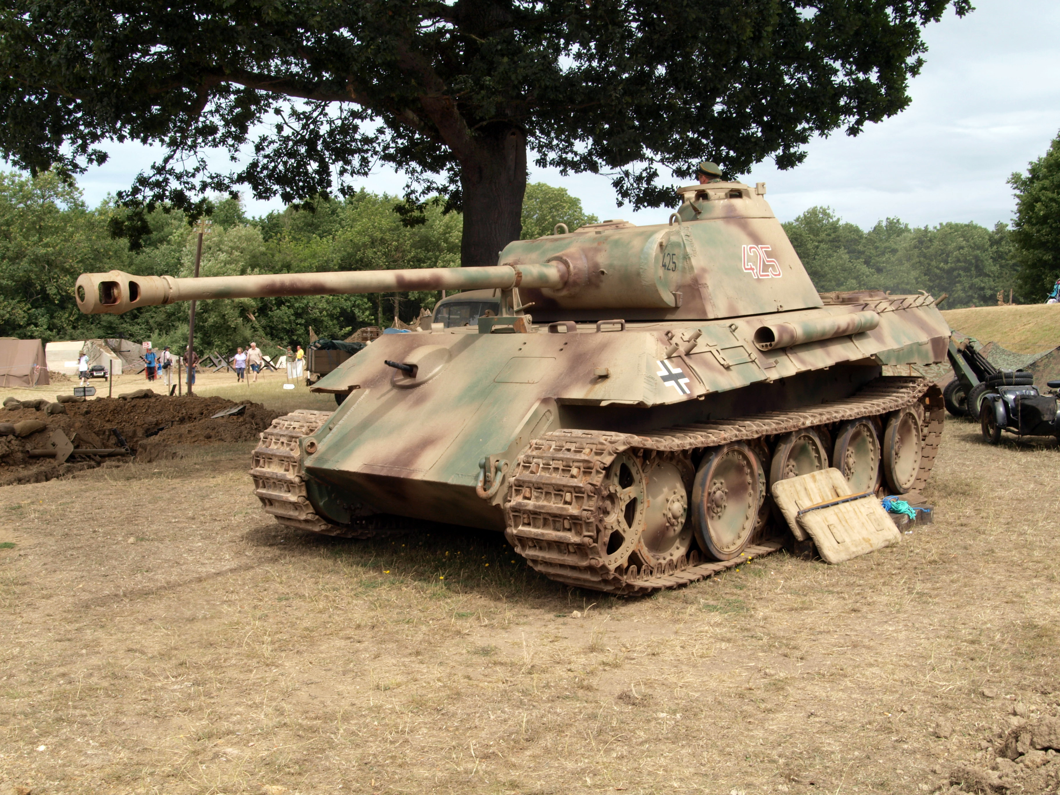 Panzer V, Panther